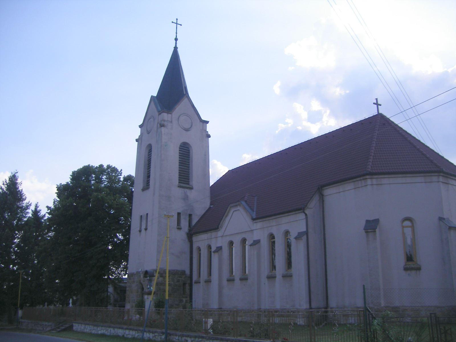 Nagycsalomja - katolikus templom